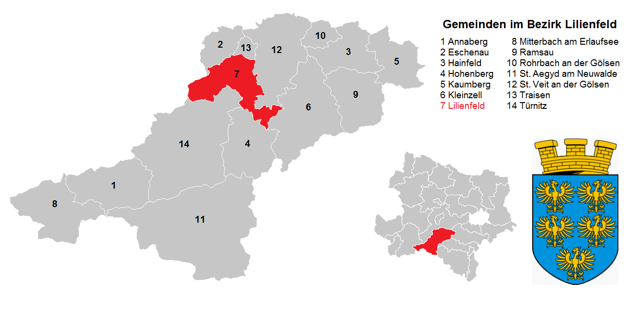 Bezirk Lilienfeld